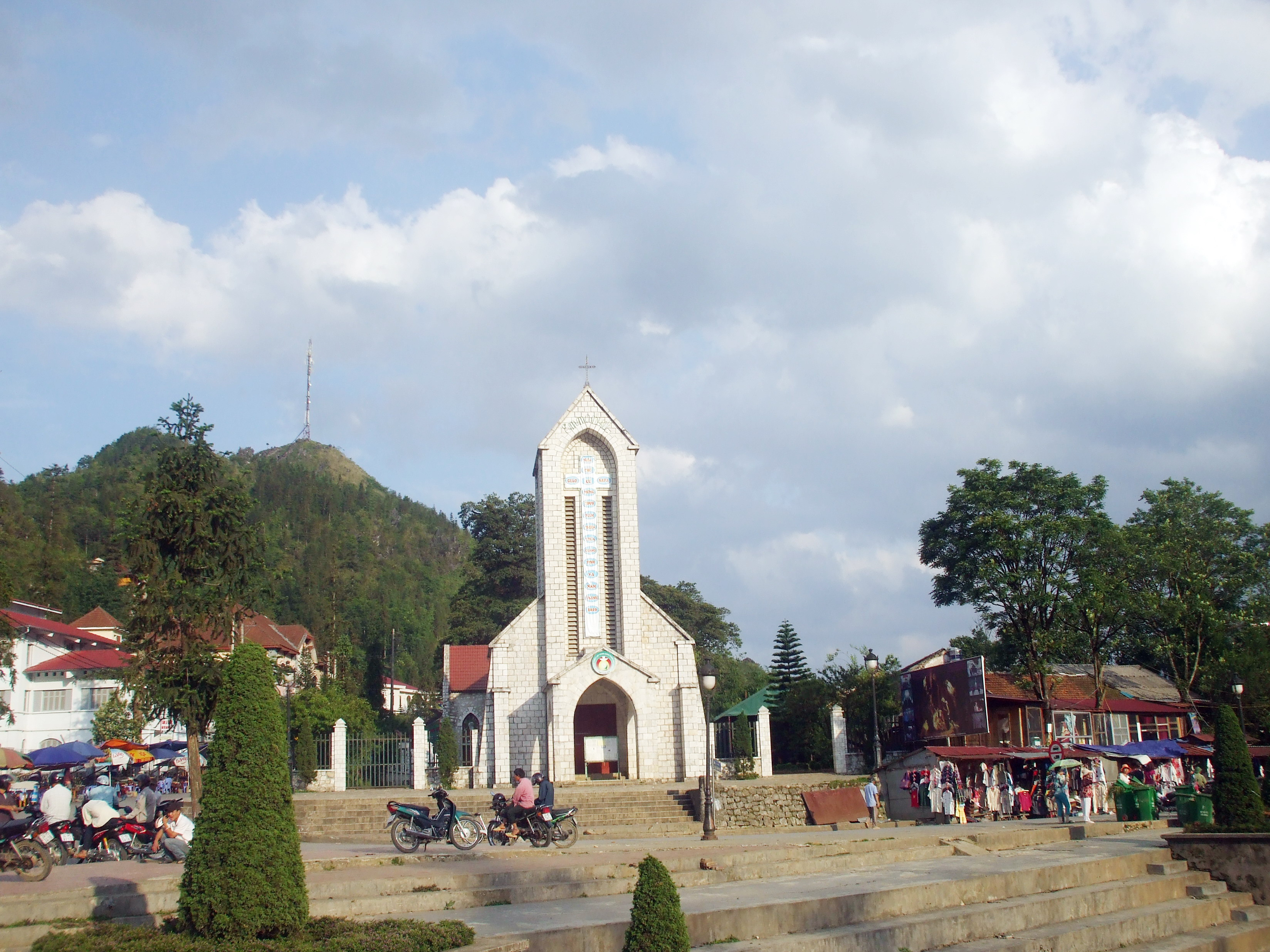 Nhà thờ đá tại trung tâm Sa Pa (Lào Cai, Việt Nam).